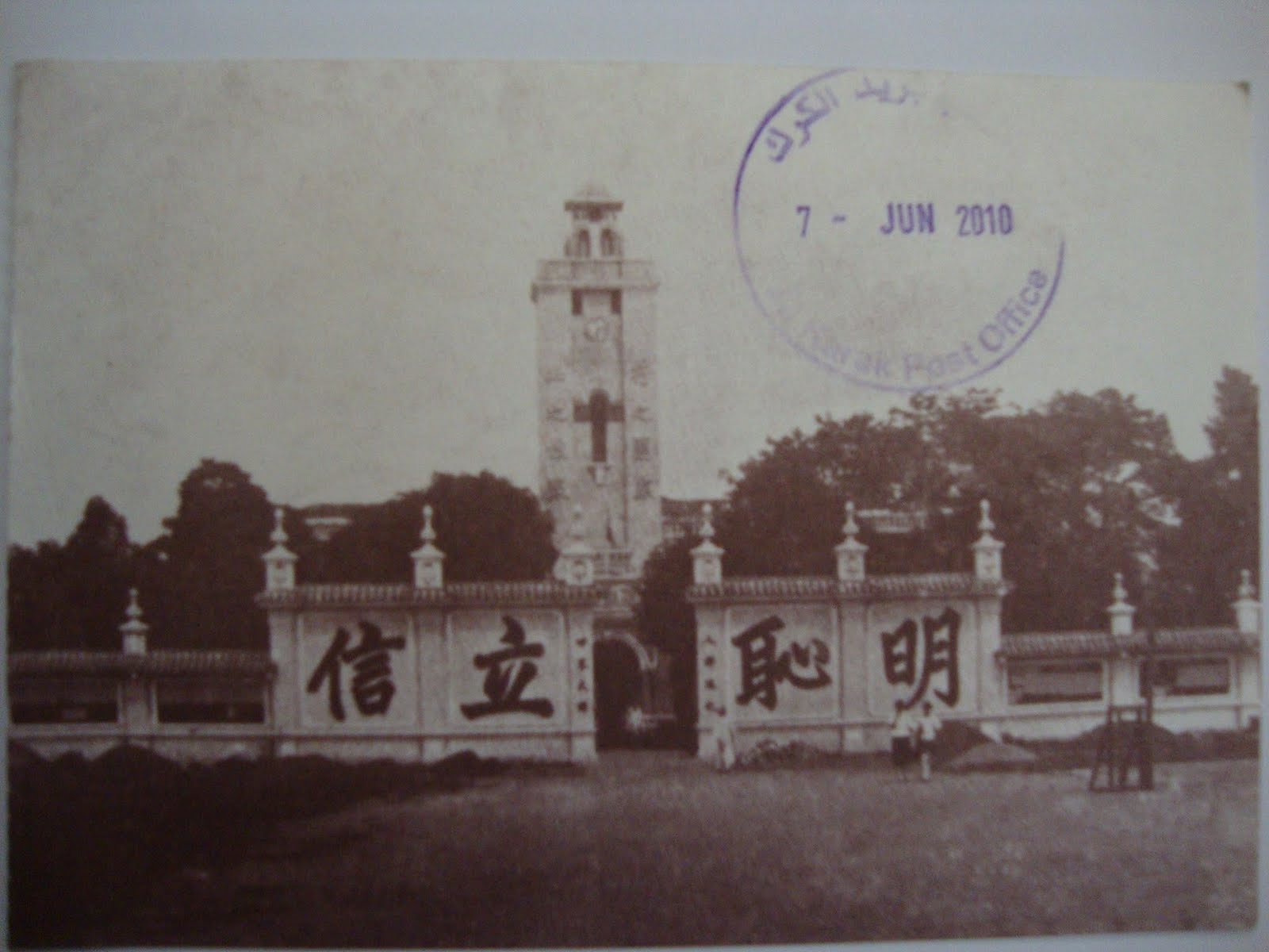 廣州市文明路的國立中山大學鐘樓，中國國民黨第一次全國代表大會曾於此召開，現在是魯迅博物館。當今中山大學校徽上的鐘樓就是這棟。